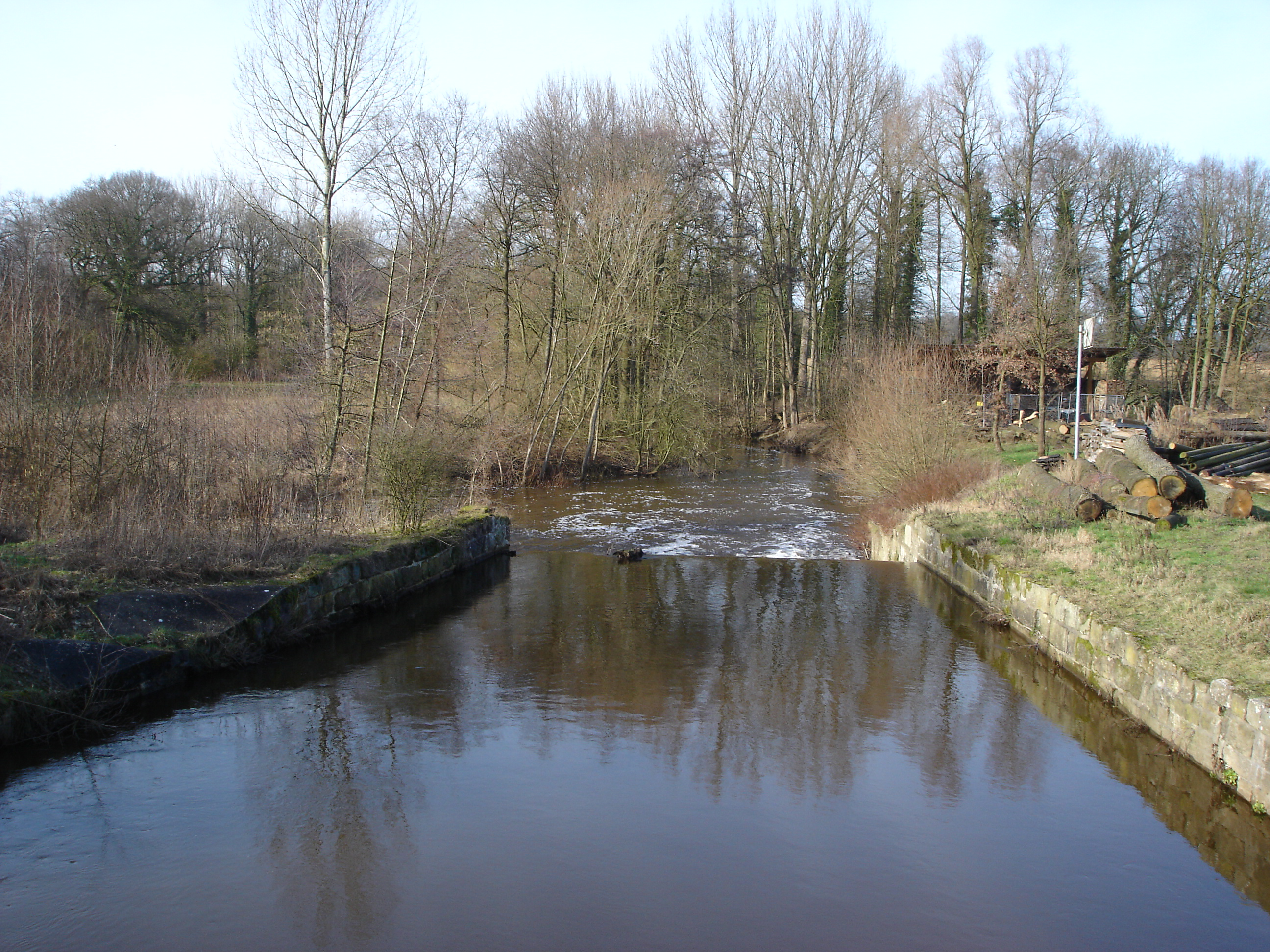 River "Glane" in Schmedehausen, Greven, Germany